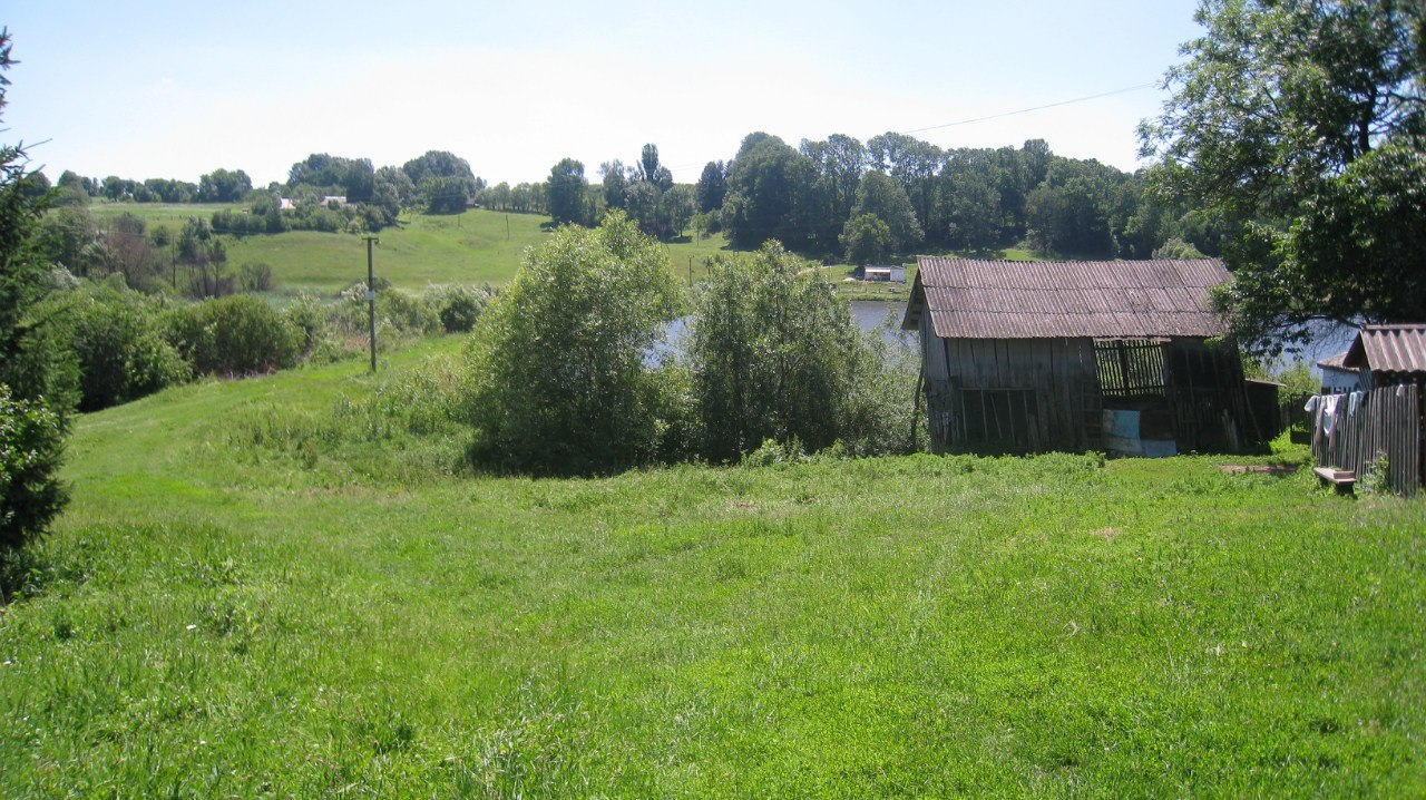 вид на куток Плінгіри